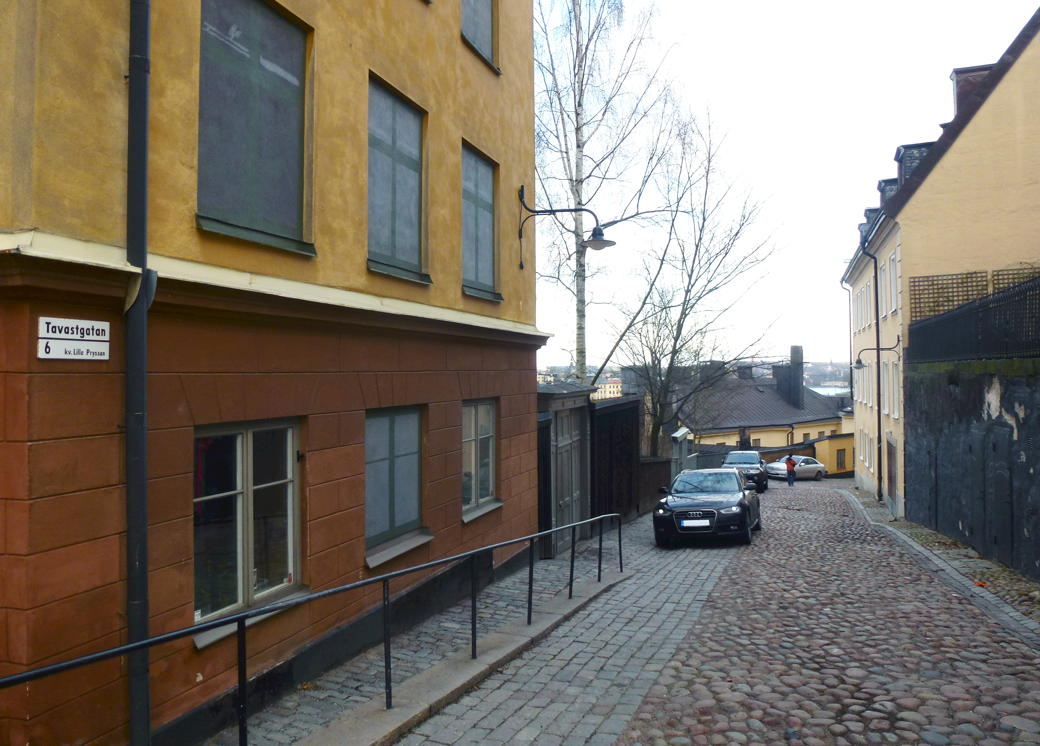 Tavastgatan mot ost